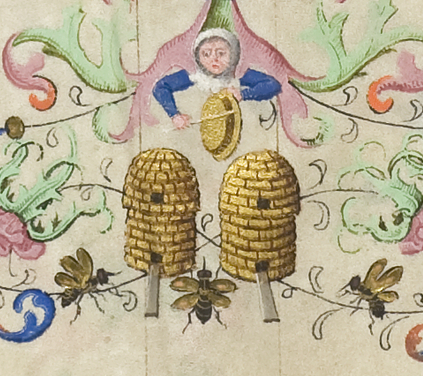 Hs. 400, f. 14v. Initiaal: Wijding van een acoliet door een bisschop, Marges: Imker met twee korven en bijen,.